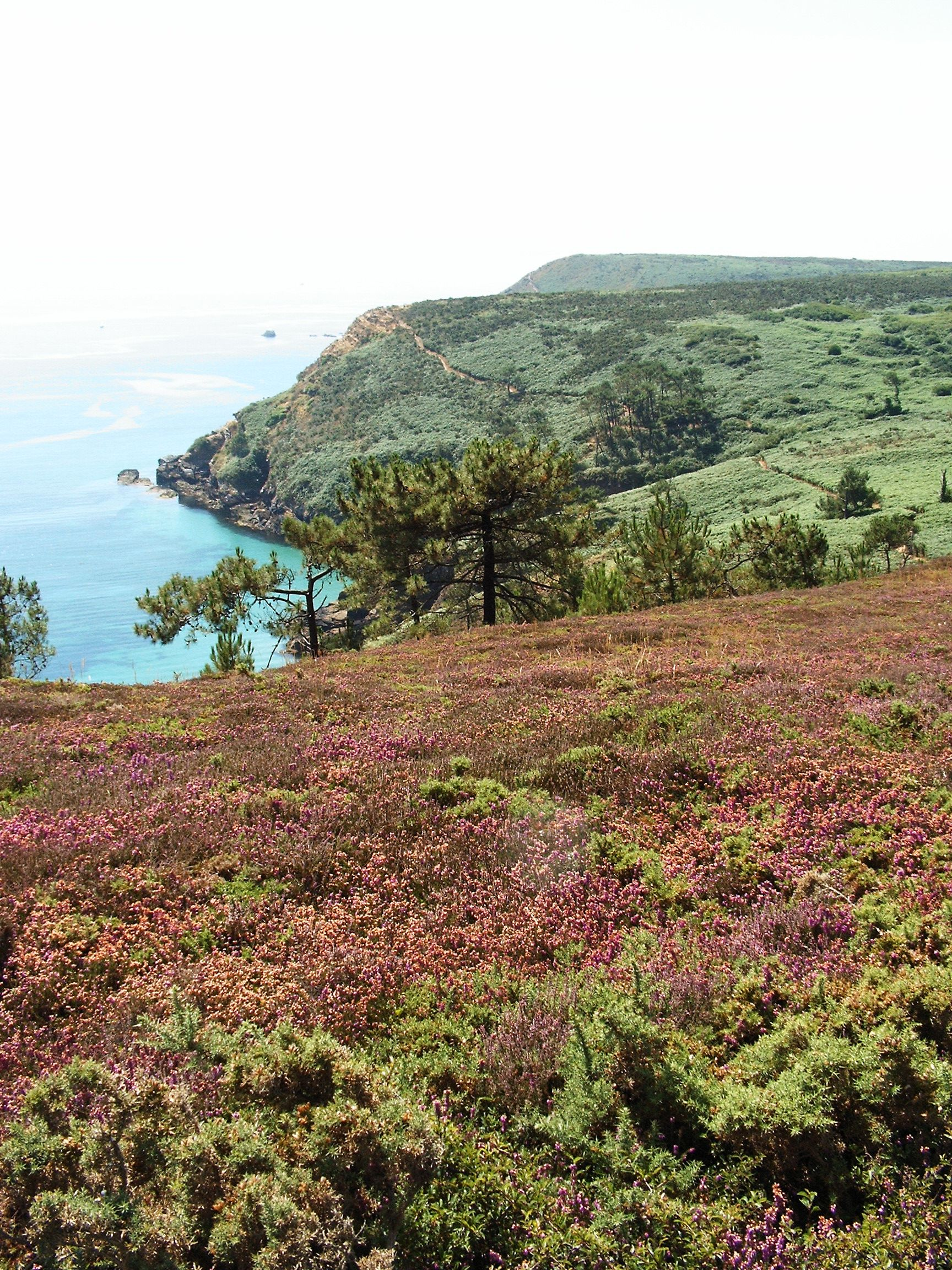 Cap de la Chevre (Halbinsel Crozon) in der Bretagne